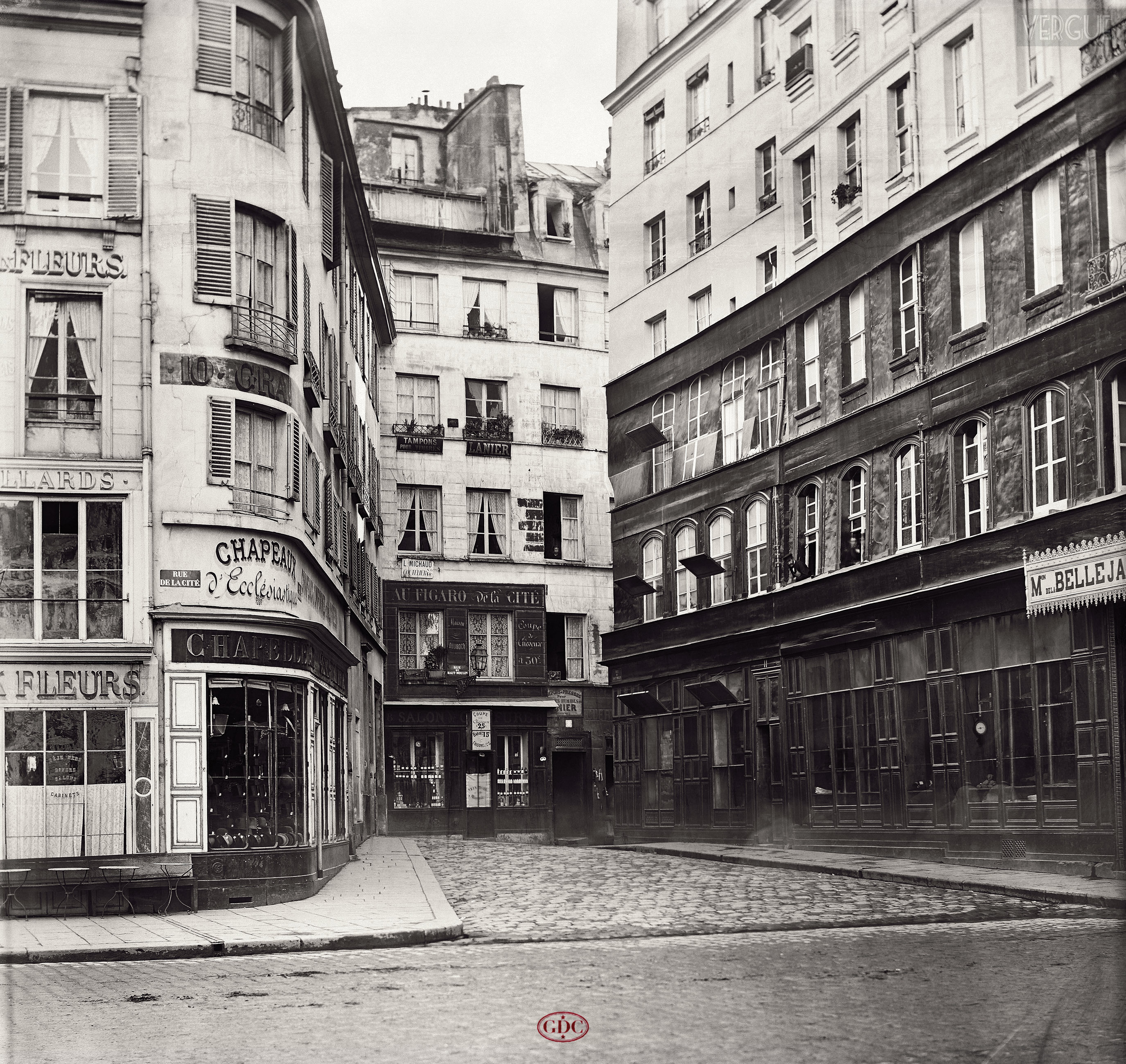 Rue du Haut-Moulin depuis le marché aux Fleurs (rue de la Cité) ; cette rue a disparu en 1866-1867 afin de construire l'actuel Hôtel-Dieu.